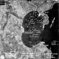 La Luftwaffe (Germania nazista) fotografa il Porto Grande di Siracusa (10 agosto 1943)